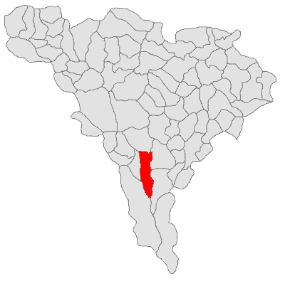 Categorie:Hărţi ale judeţului Alba